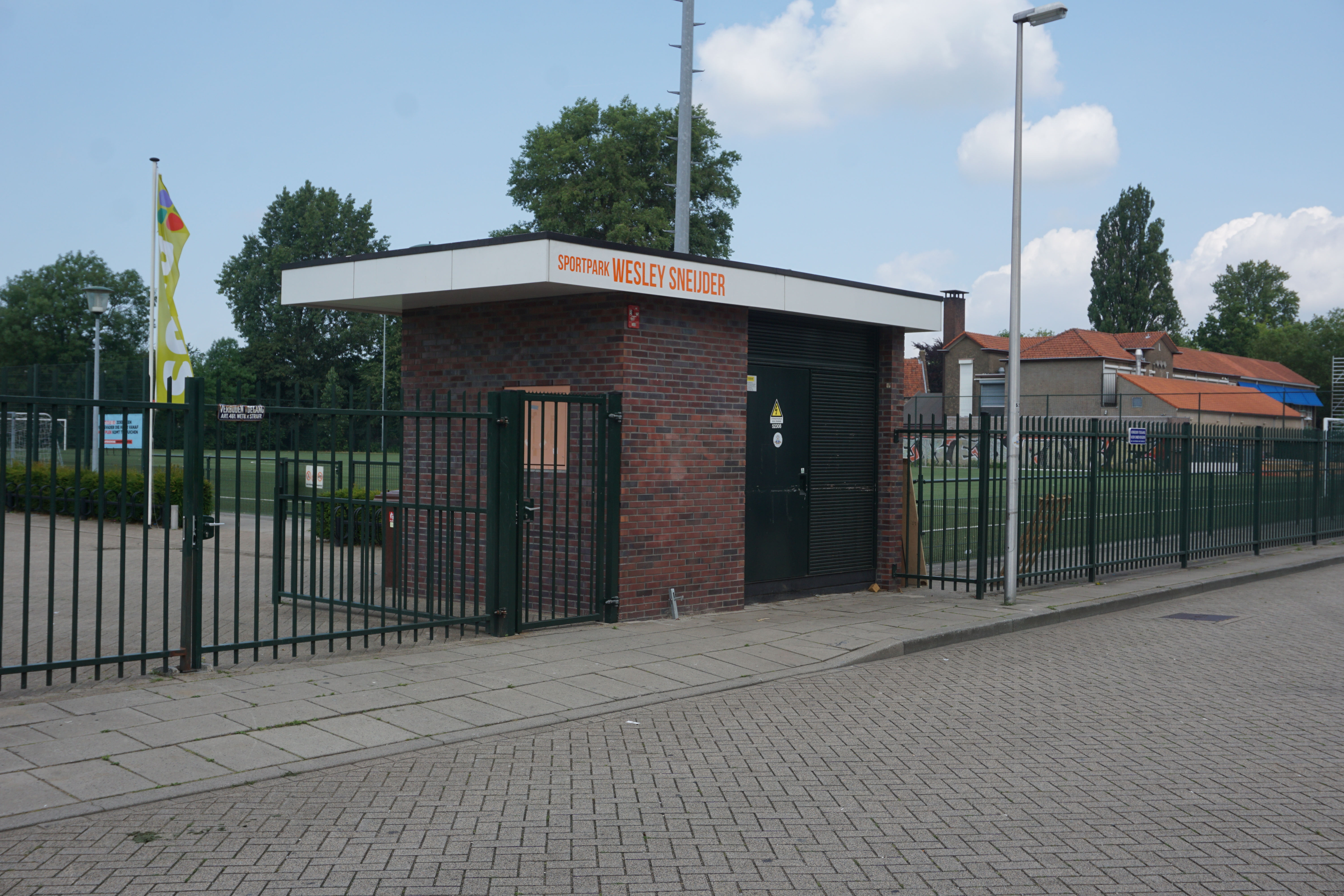 Sportpark Wesley Sneijder aan de Thorbeckelaan te Utrecht. Genoemd naar de in Ondiep geboren en getogen voetballer Wesley Snijder.